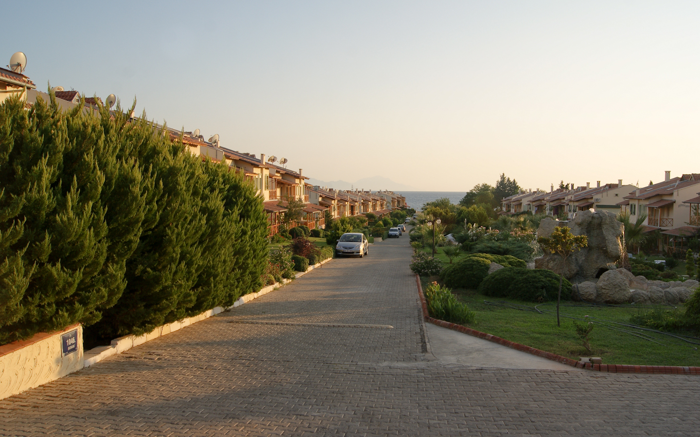 Strandsiedlung in Izmir